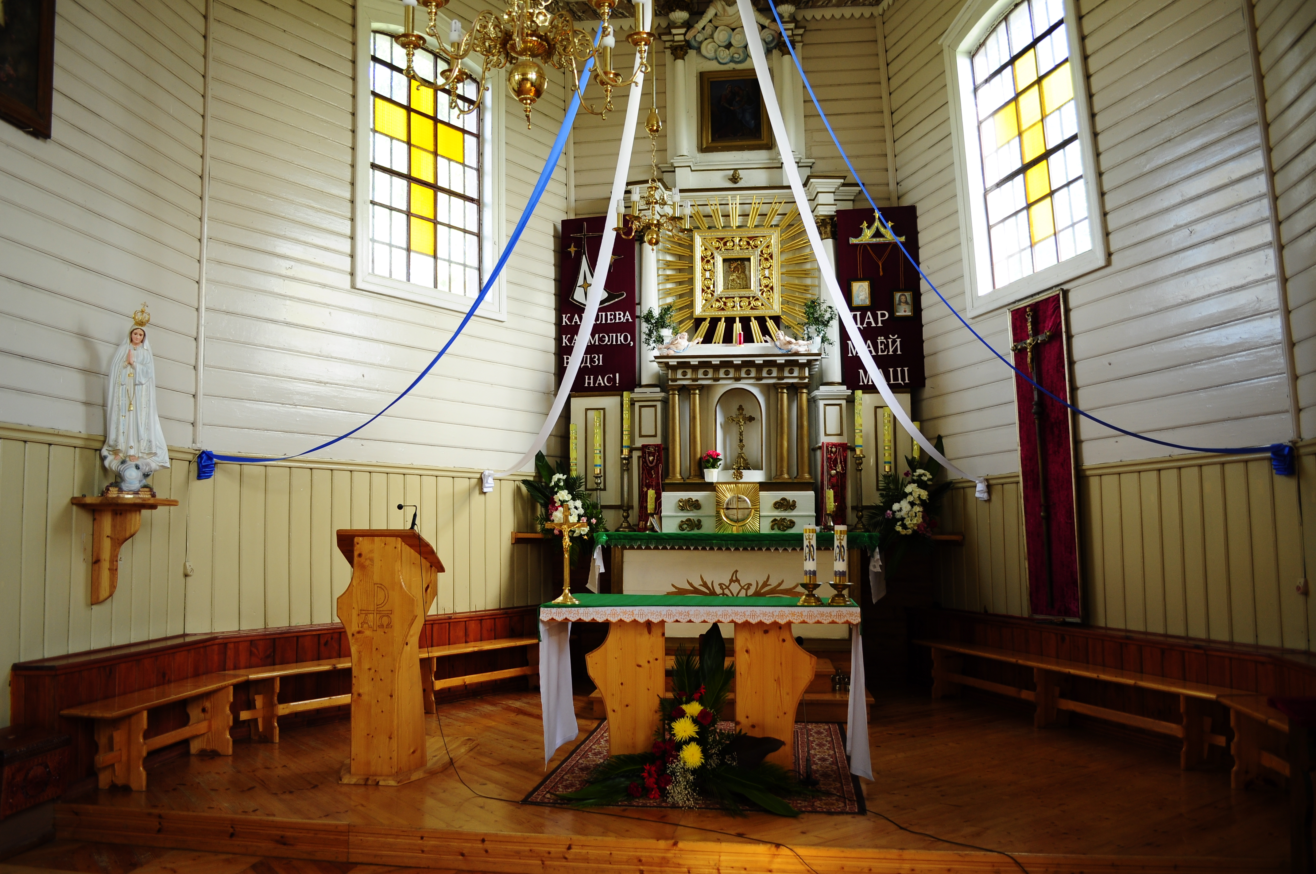 Беларуская (тарашкевіца): Гудагай. касьцёл Маці Божай Шпаклернай This is a photo of Belarusian heritage monument. Reference number: 412Г000042 ( WLM)